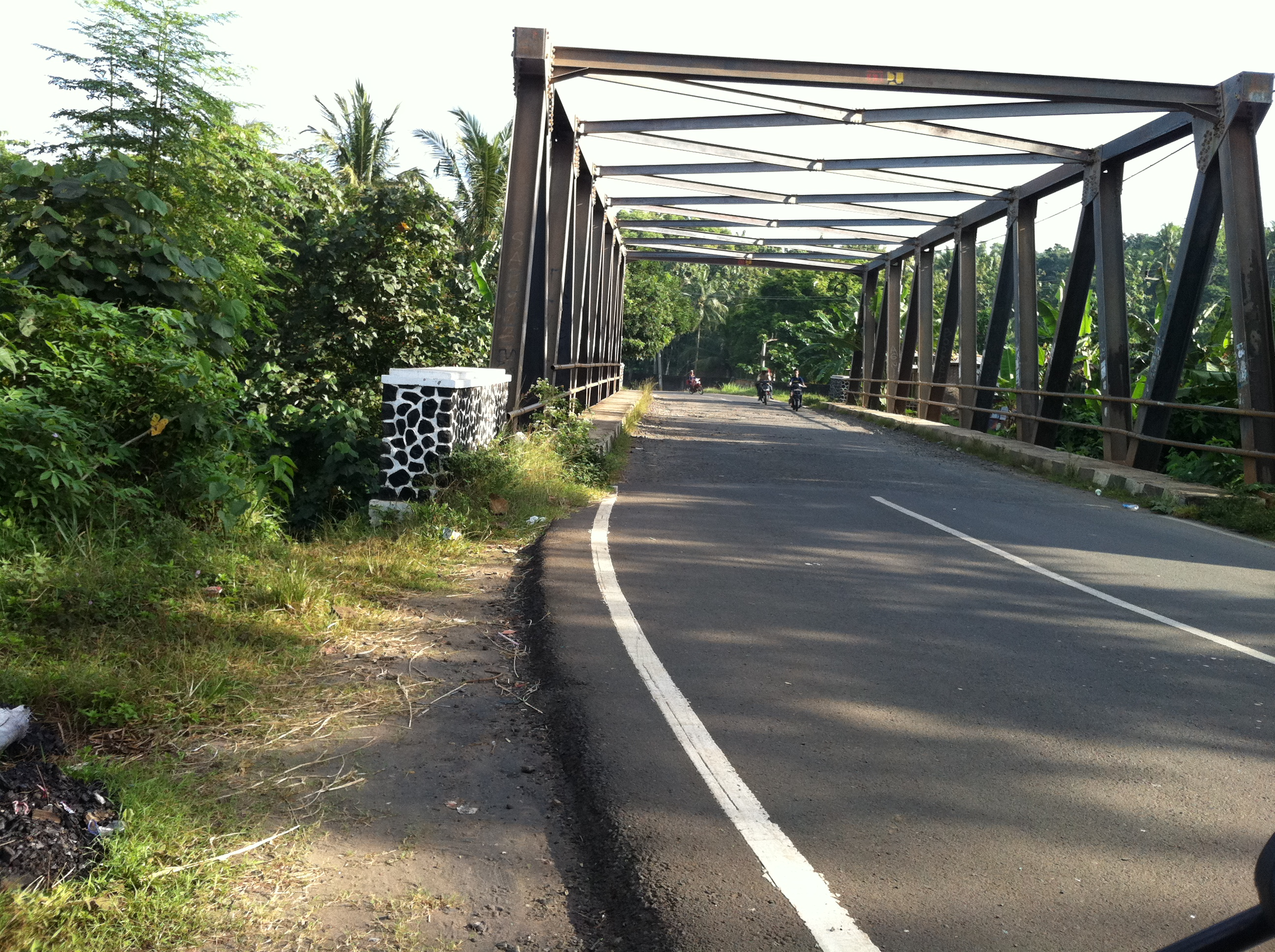 Karyamukti, Cibalong, Garut Regency, West Java, Indonesia